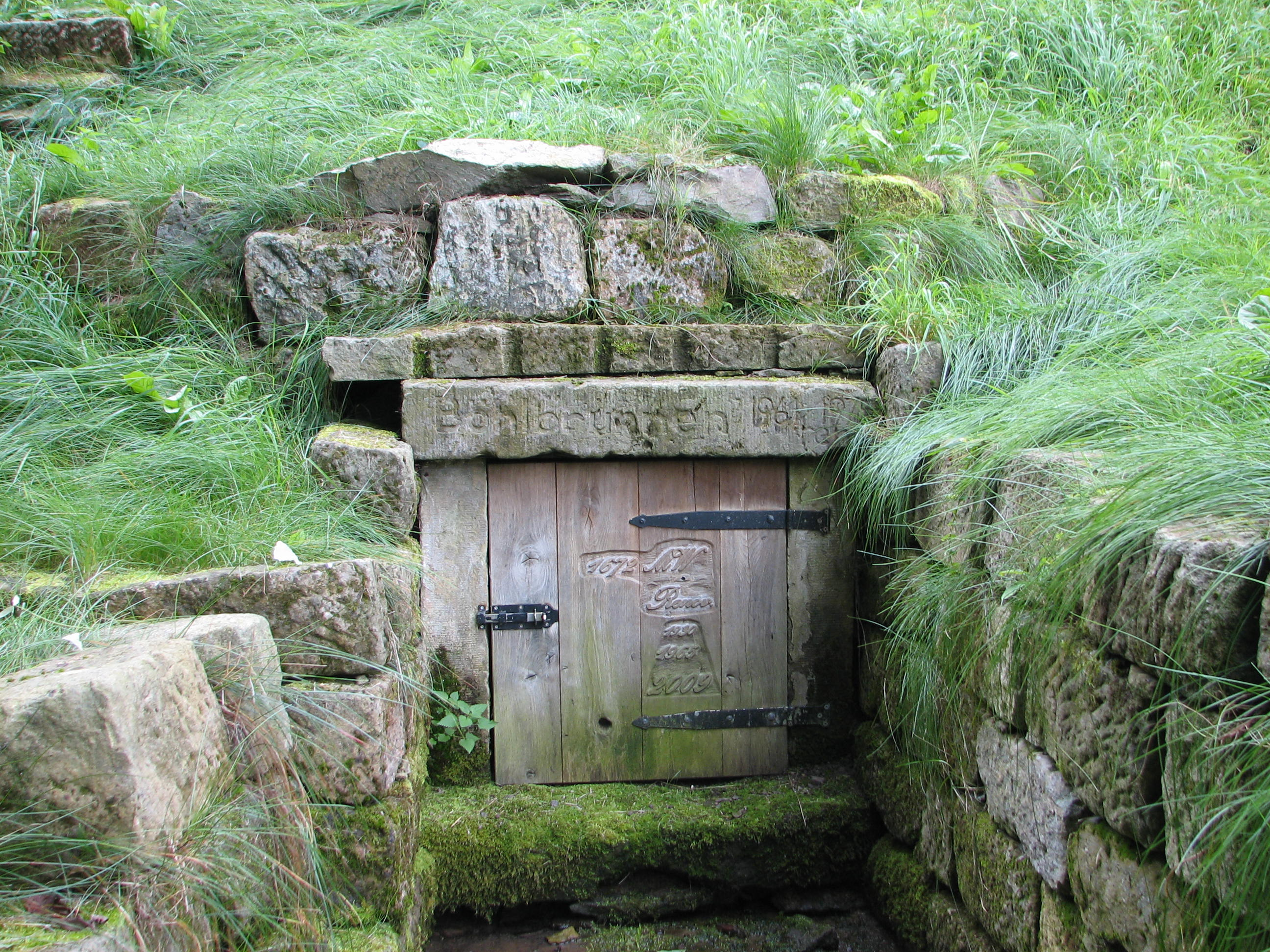 denkmalgeschützter Böhlbrunnen in Freital-Wurgwitz, Zöllmener Straße